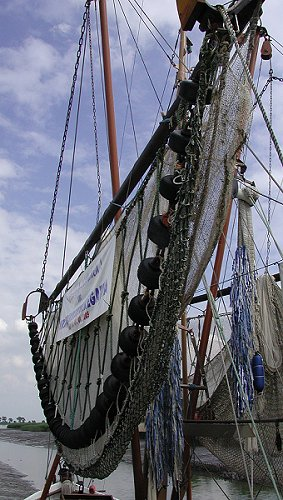 Baumkurre Motiv: Baumkurre (Grundnetz an Mastbaum) an einem Fischkutter Foto: Wilfried Wittkowsky, 2005